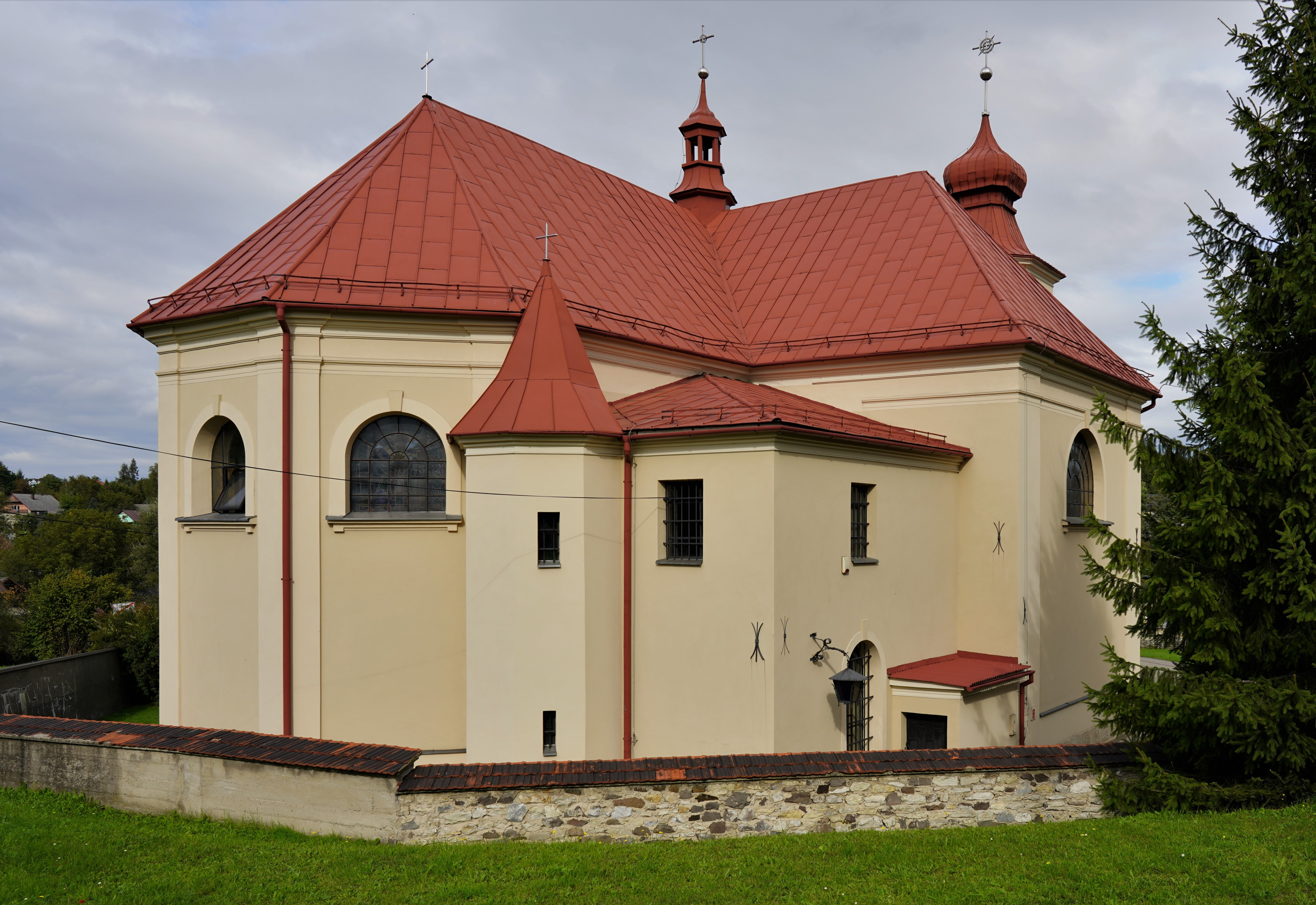 Poręba Żegoty, Zespół kościoła parafialnego św. Marcina i św. Małgorzaty, Q30158775